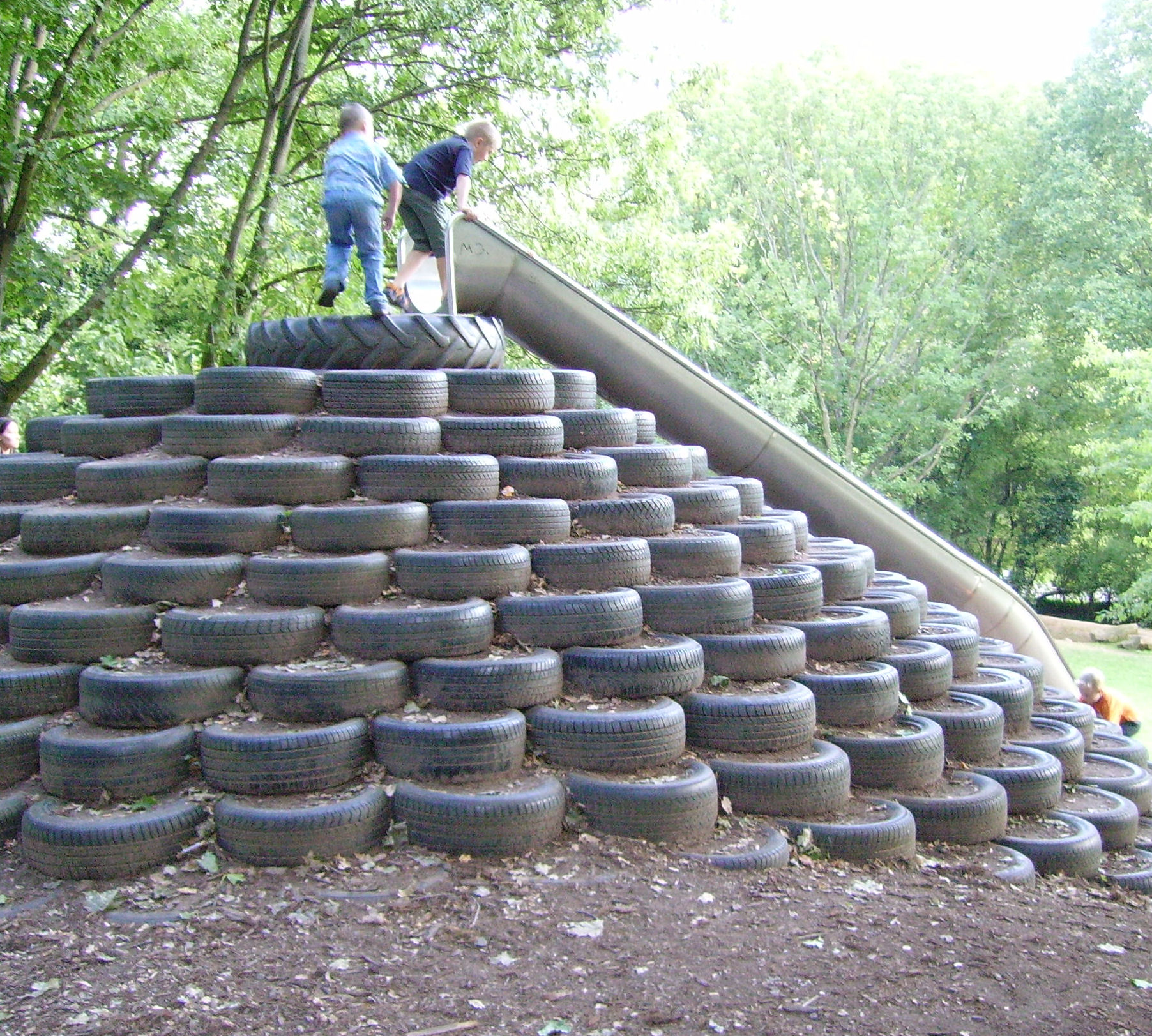 Volkspark of Kaiserslautern in Rheinland-Pfalz (Germany)